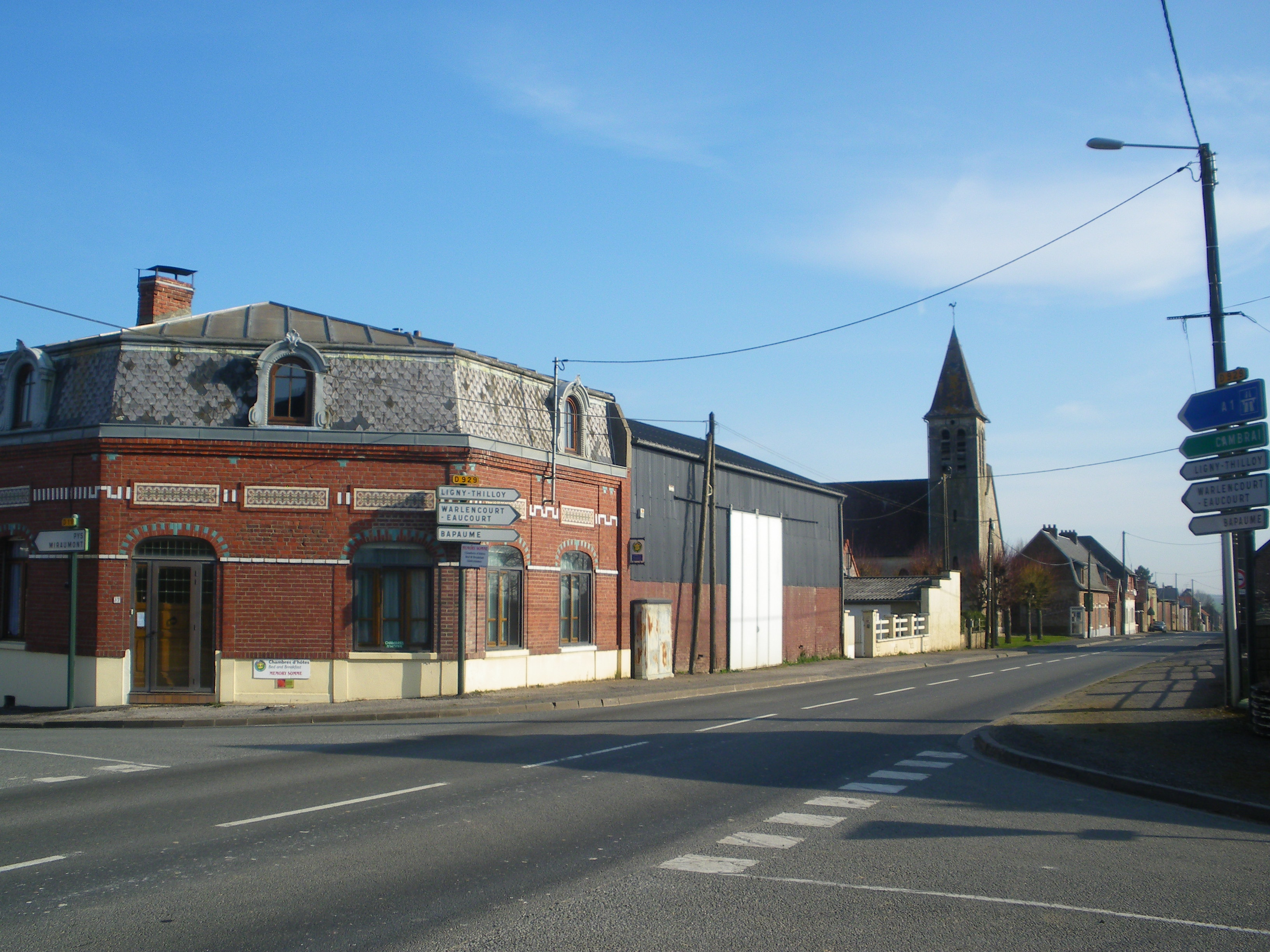 Vue de la commune du Sars.